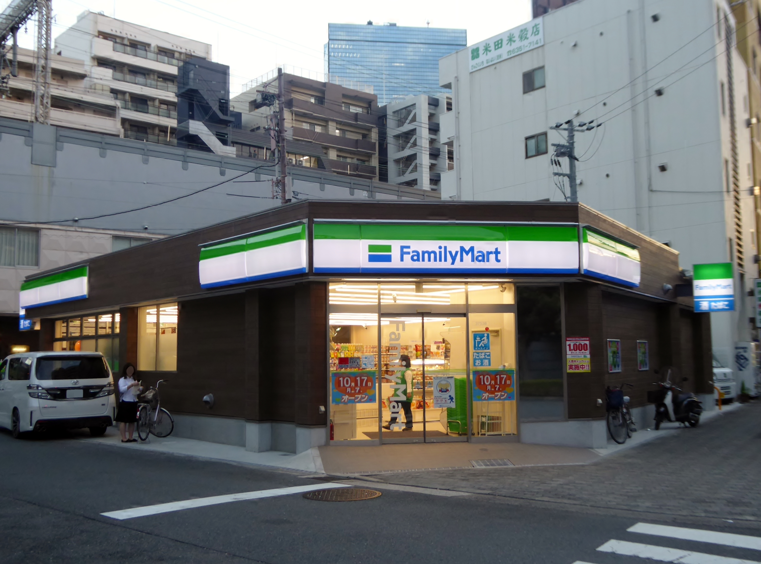 ファミリーマート京橋駅前店を撮影。